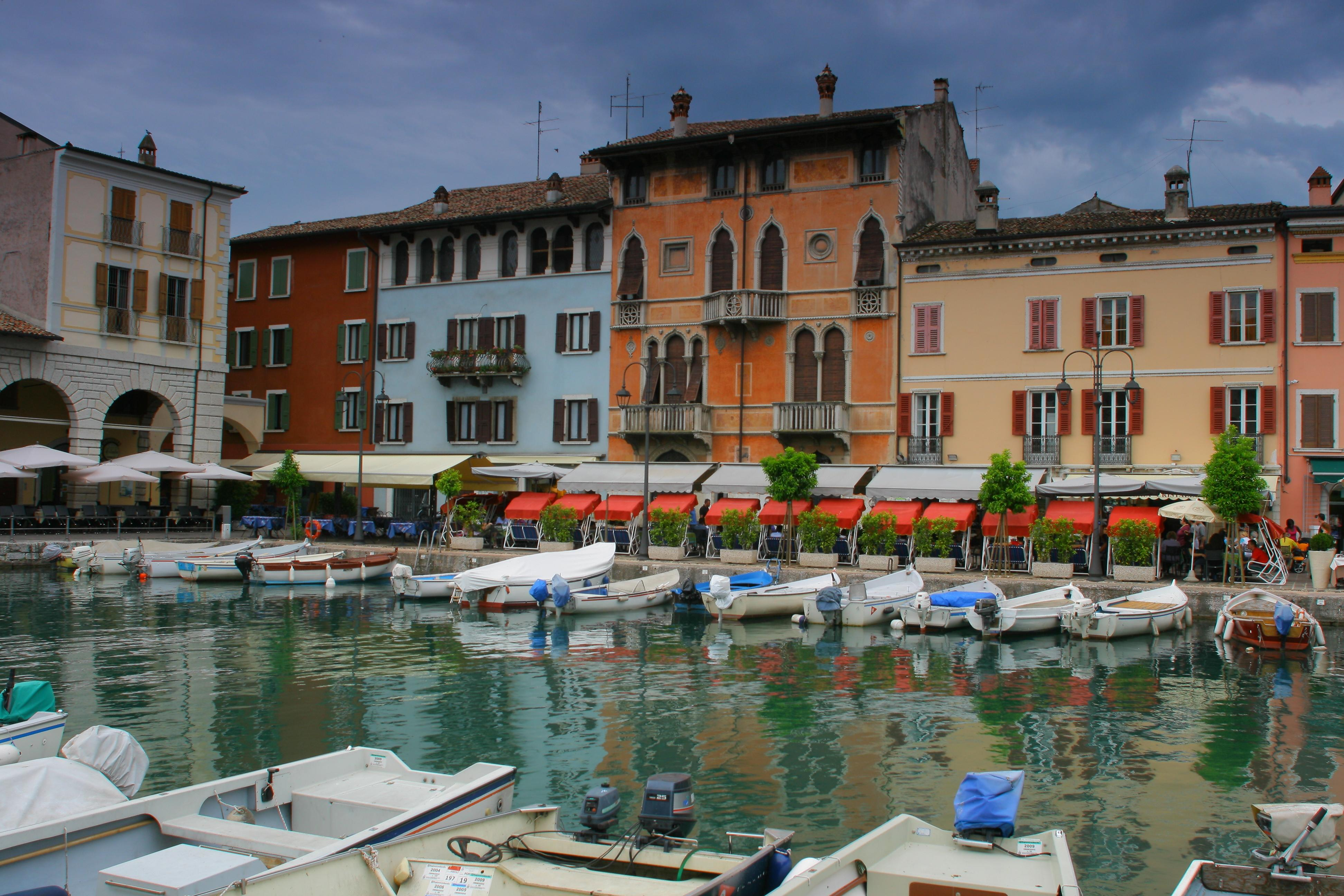 25015 Desenzano del Garda, Province of Brescia, Italy